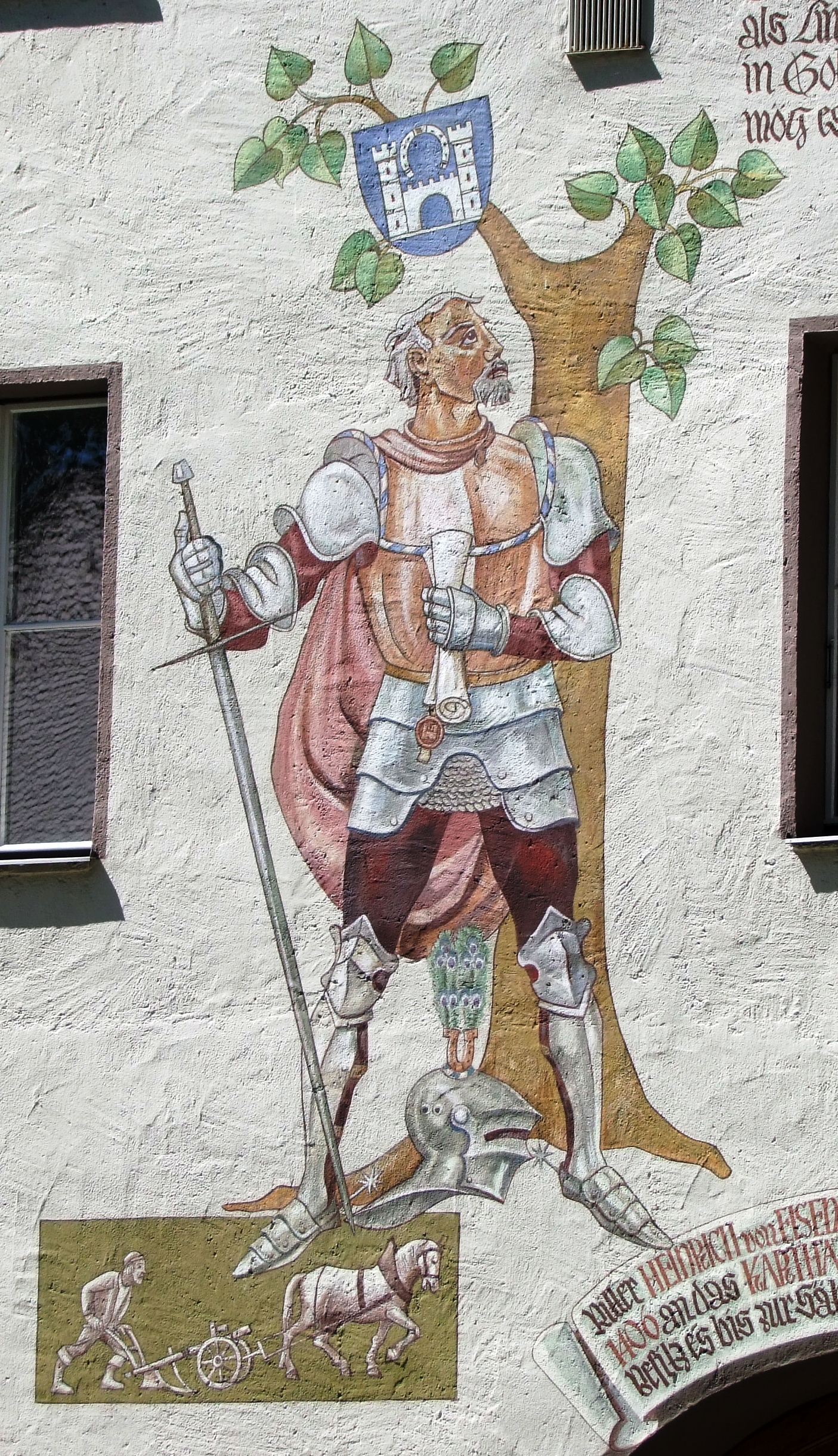 Das Buxheimer Haus in Memmingen am Martin-Luther-Platz vor der St. Martinskirche